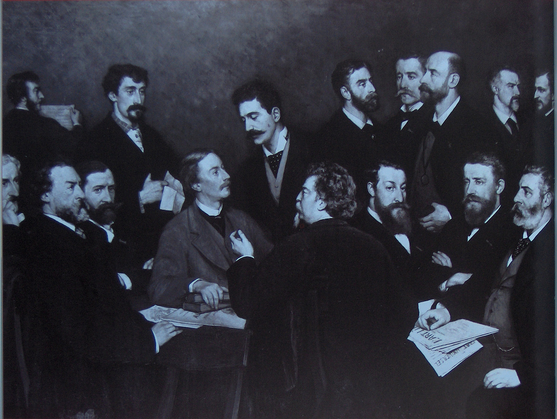 "De leden van de Société Libre des beaux-Arts" door Edmond Lambrichs (1830-1887); zittend van links naar rechts : E. Huberti, F. Boudin, Ch. Degroux, C. Van Camp, F. Bouré, A.Verwée, C. Meunier, L. Dubois. staand, van links naar rechts : E. Lambrichs, L. Artan, F. Rops, J. Raeymaeckers, J.B. Meunier, E.Smits, Th. Baron, H. De la Charlerie Bezit : KMSKB, Brussel